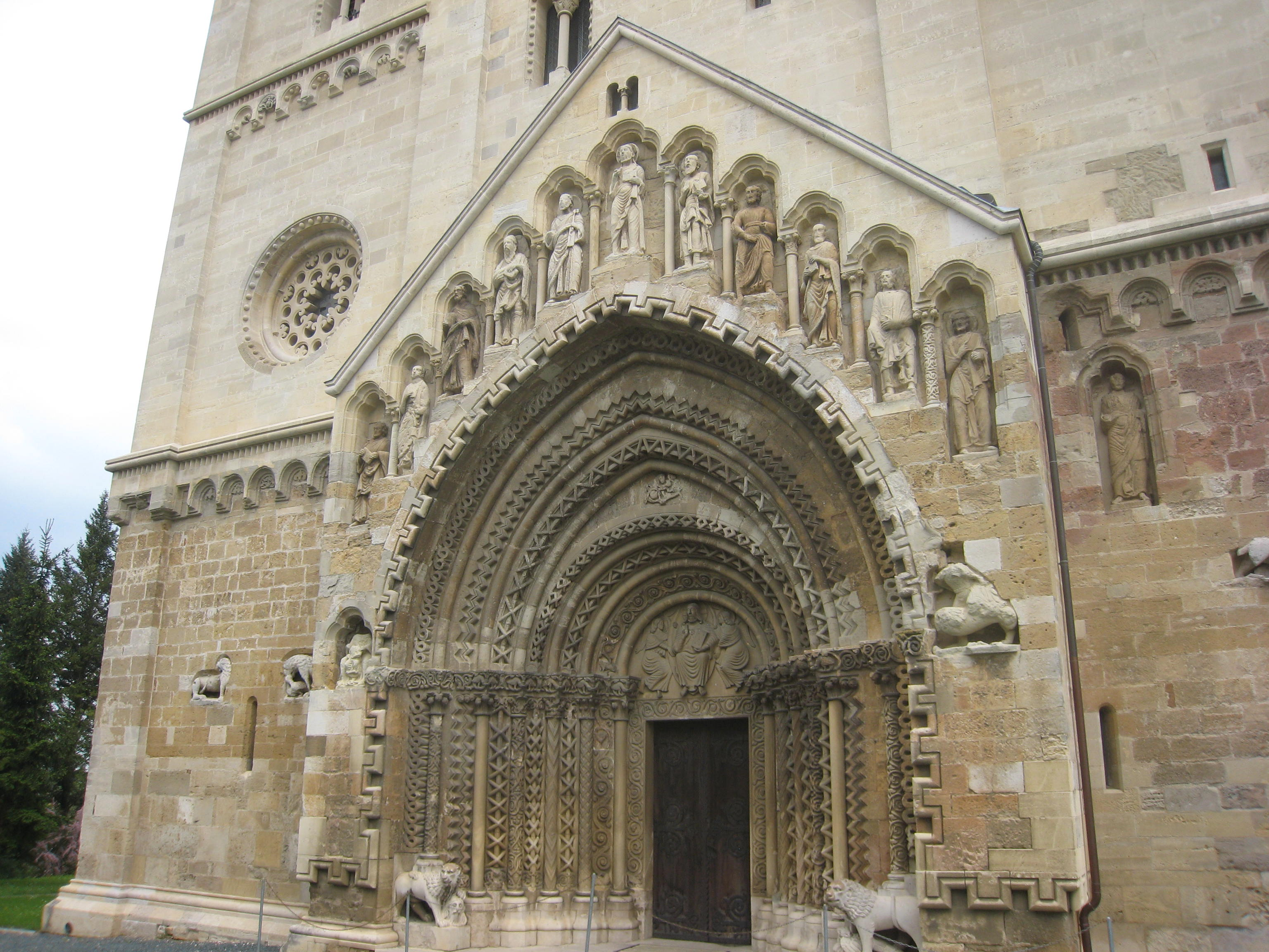 Cerkev sv. Jurija, Ják, Madžarska; zahodni, glavni portal.